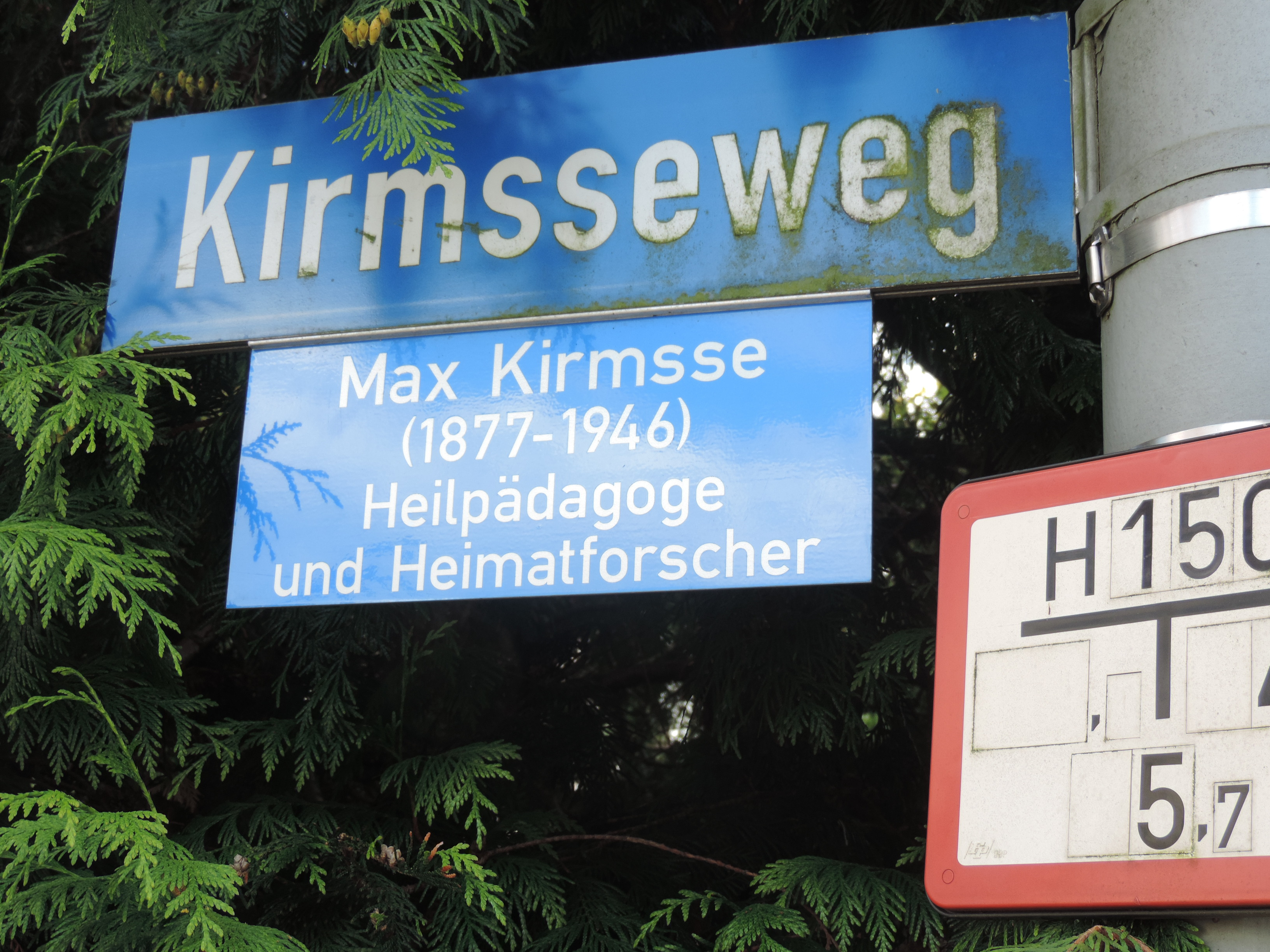 Kirmsseweg